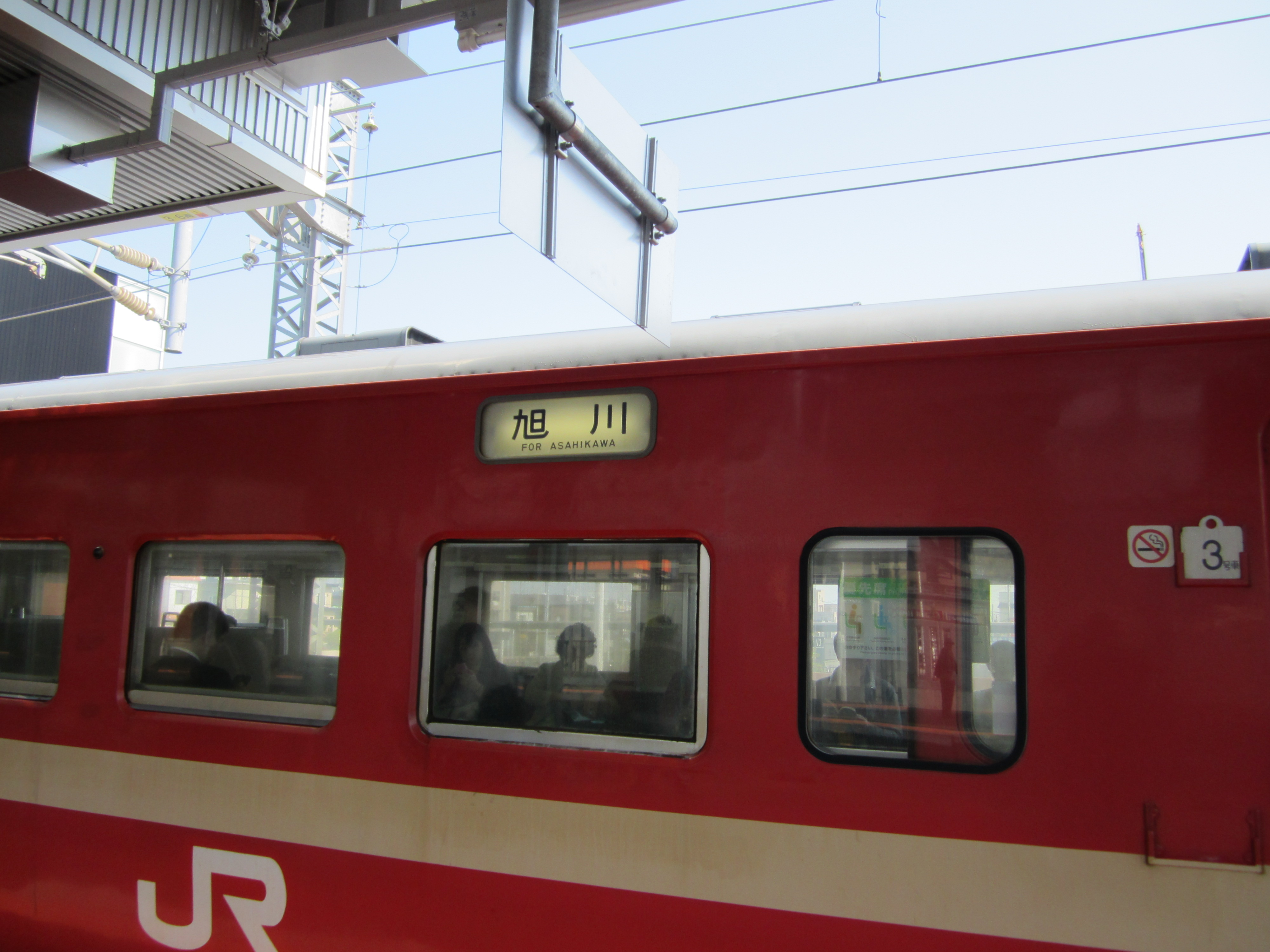 2012年5月現在、1日1本のみ運行している小樽－旭川間を走行する普通列車、6両編成だが後ろ3両は岩見沢止まり